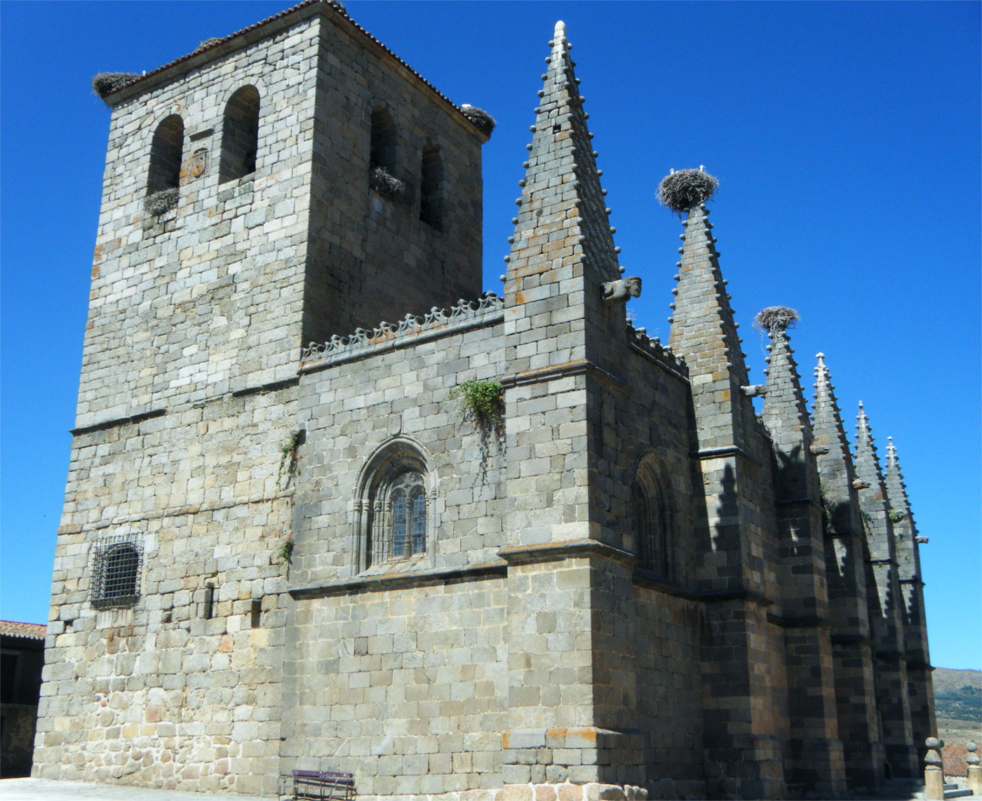 Sede: Ávila AUTOR: Sonia Cubillo